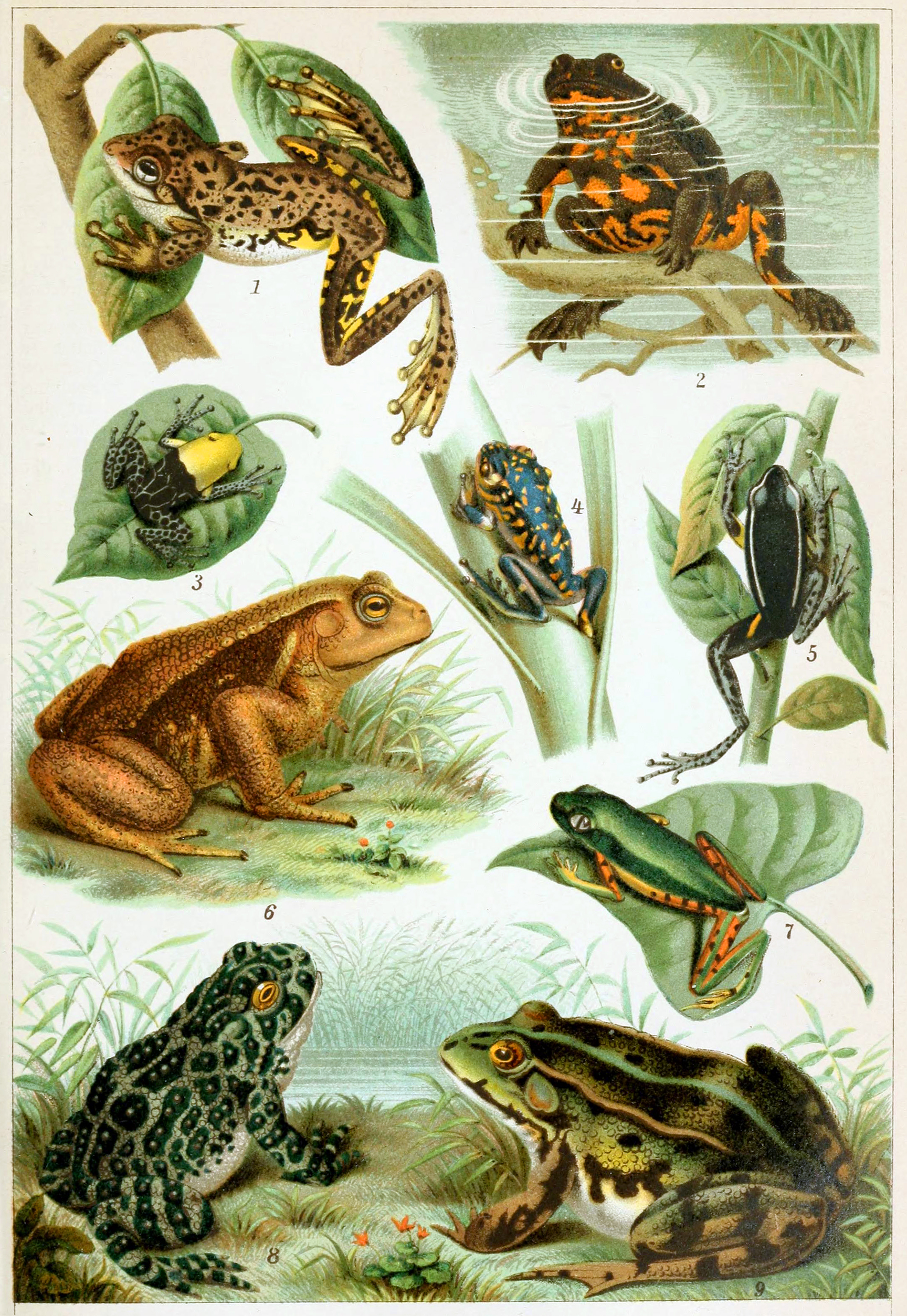 Anura 1-Litoria peronii 2-Bombina bombina 3-Ranitomeya fantastica 4-Leptopelis flavomaculatus 5-Allobates femoralis 6-Bufo japonicus 7-Phyllomedusa hypochondrialis 8-Bufo balearicus 9-Pelophylax lessonae